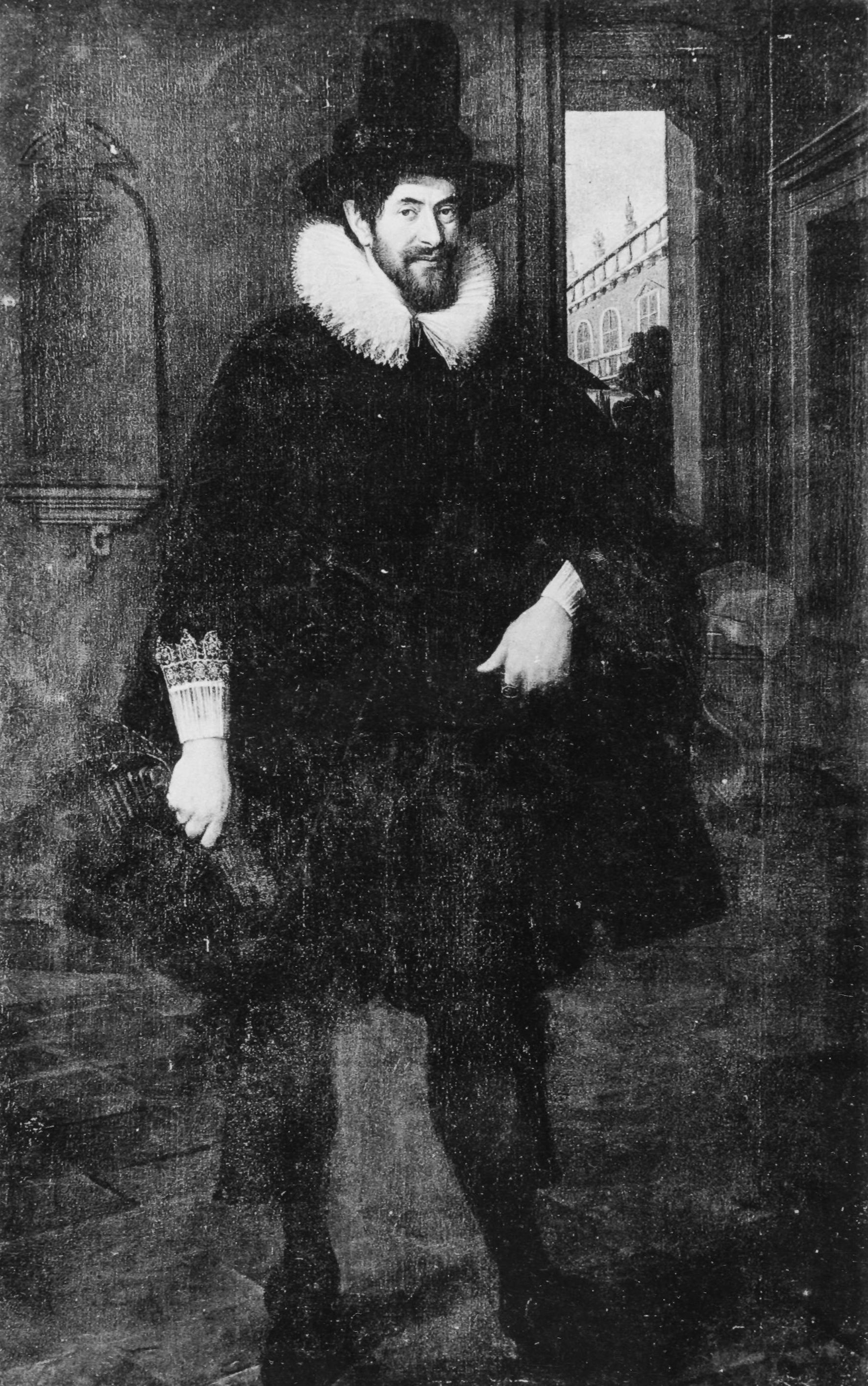 Pieter Jansz Hooft (1574/75-1636)